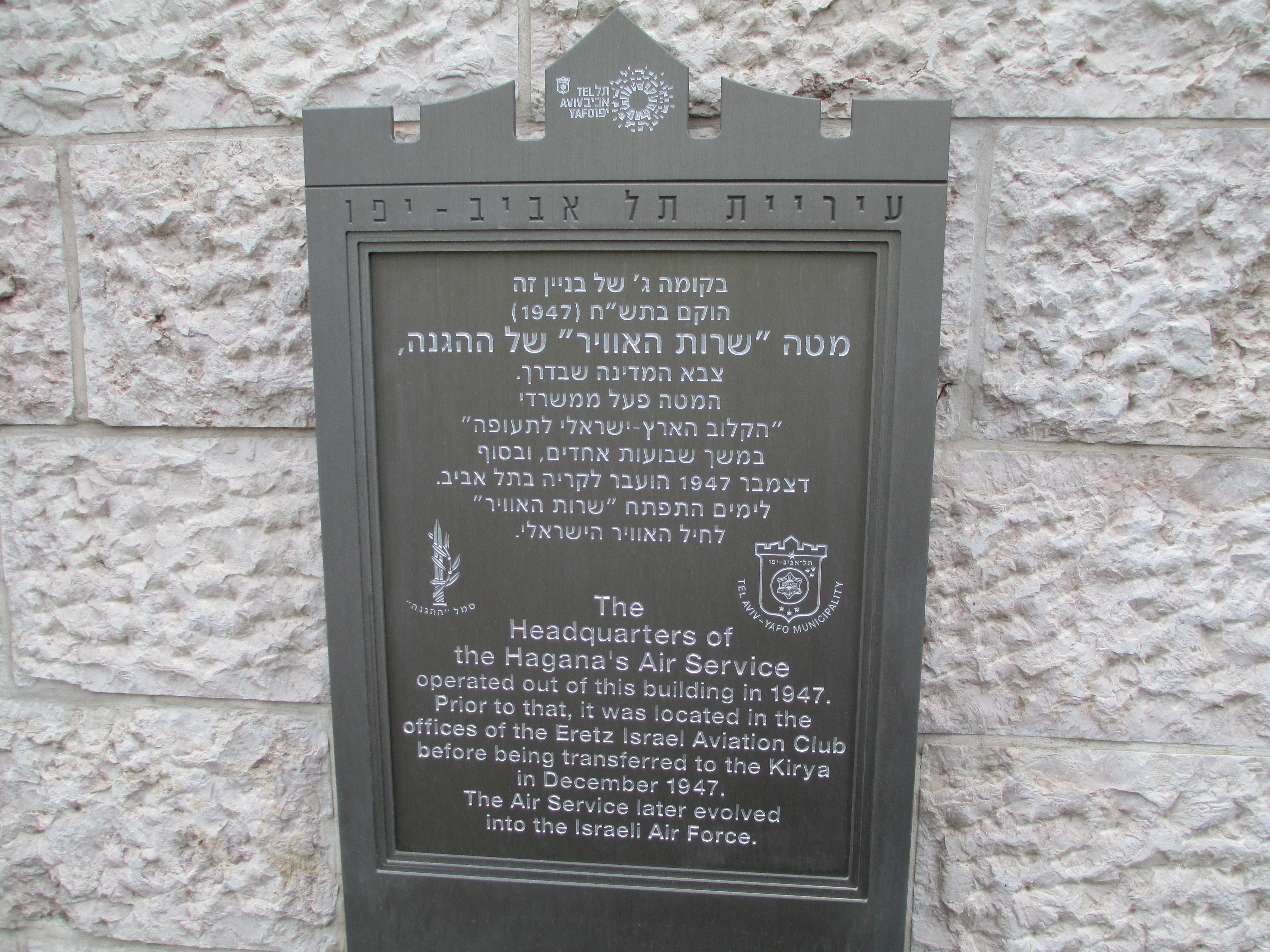 מטה שירות האוויר של ההגנה ברחוב מונטפיורי 9 בתל אביב